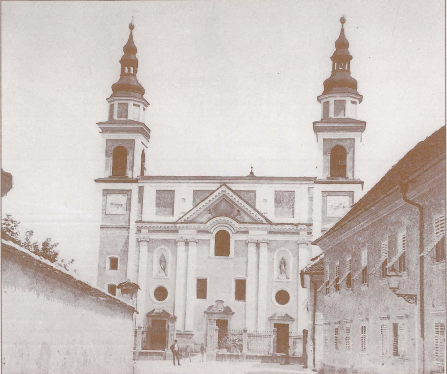 Cerkev sv. Petra